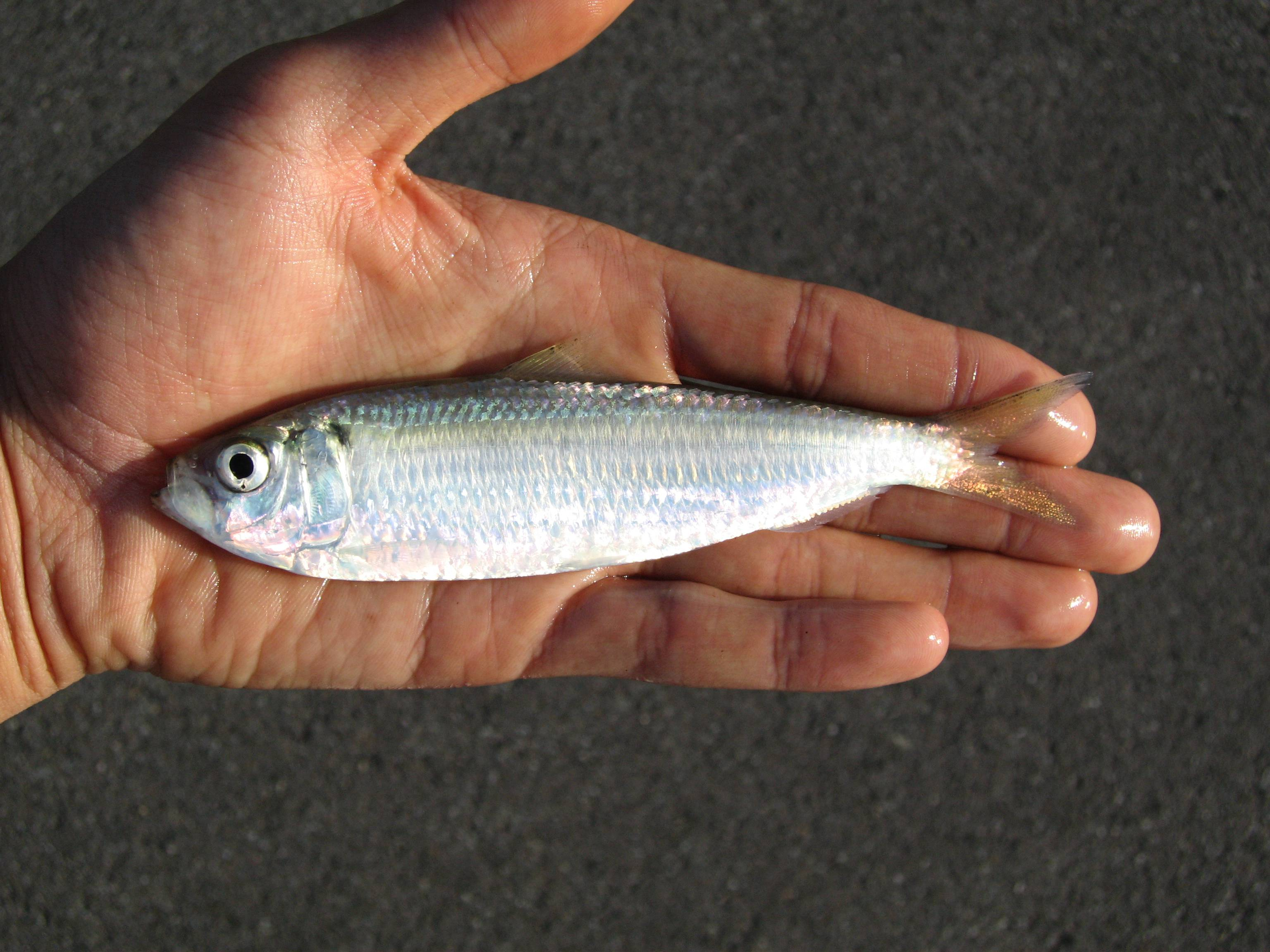 サッパ（伊勢湾）詳細